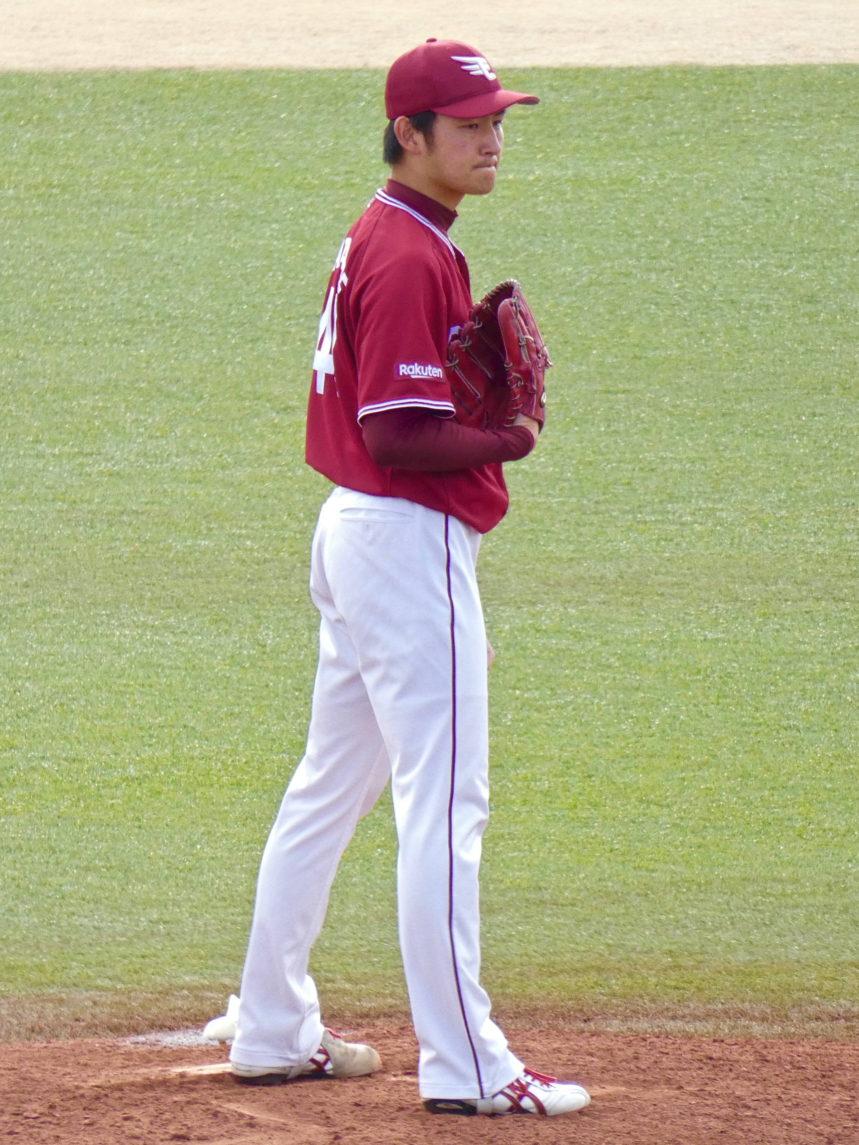 ヤクルト戸田球場にて